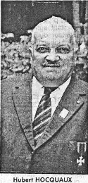 Hubert HOCQUAUX 1er Président de l'Amicale des Anciens FFI et Résistants du Maquis du Haut du Bois